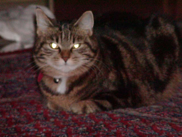 Katze Hermine